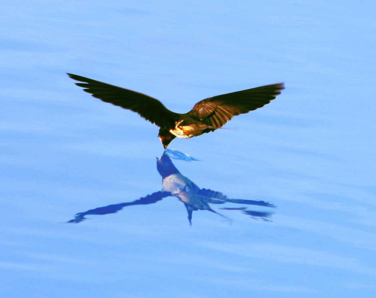 Schwalbe Hirundo rustica trinkt im Flug aus einem Pool